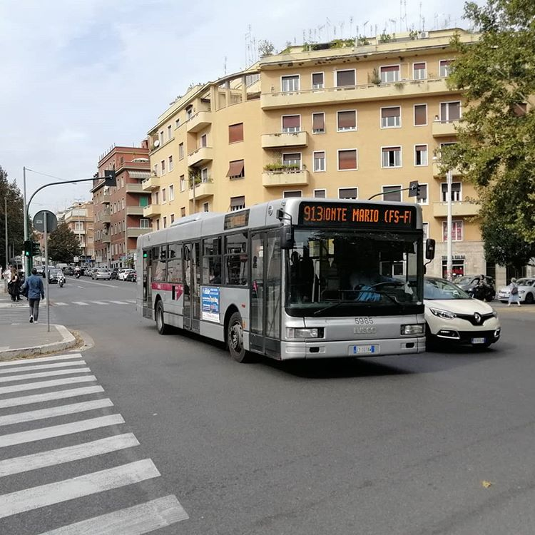 Vettura in servizio sul 913 a Roma